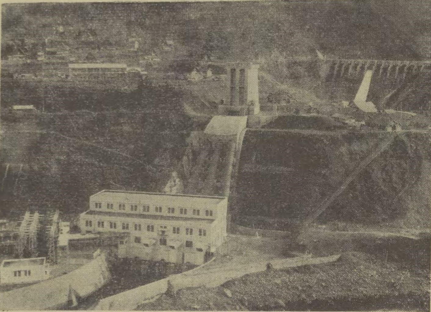 大同電力祖山発電所